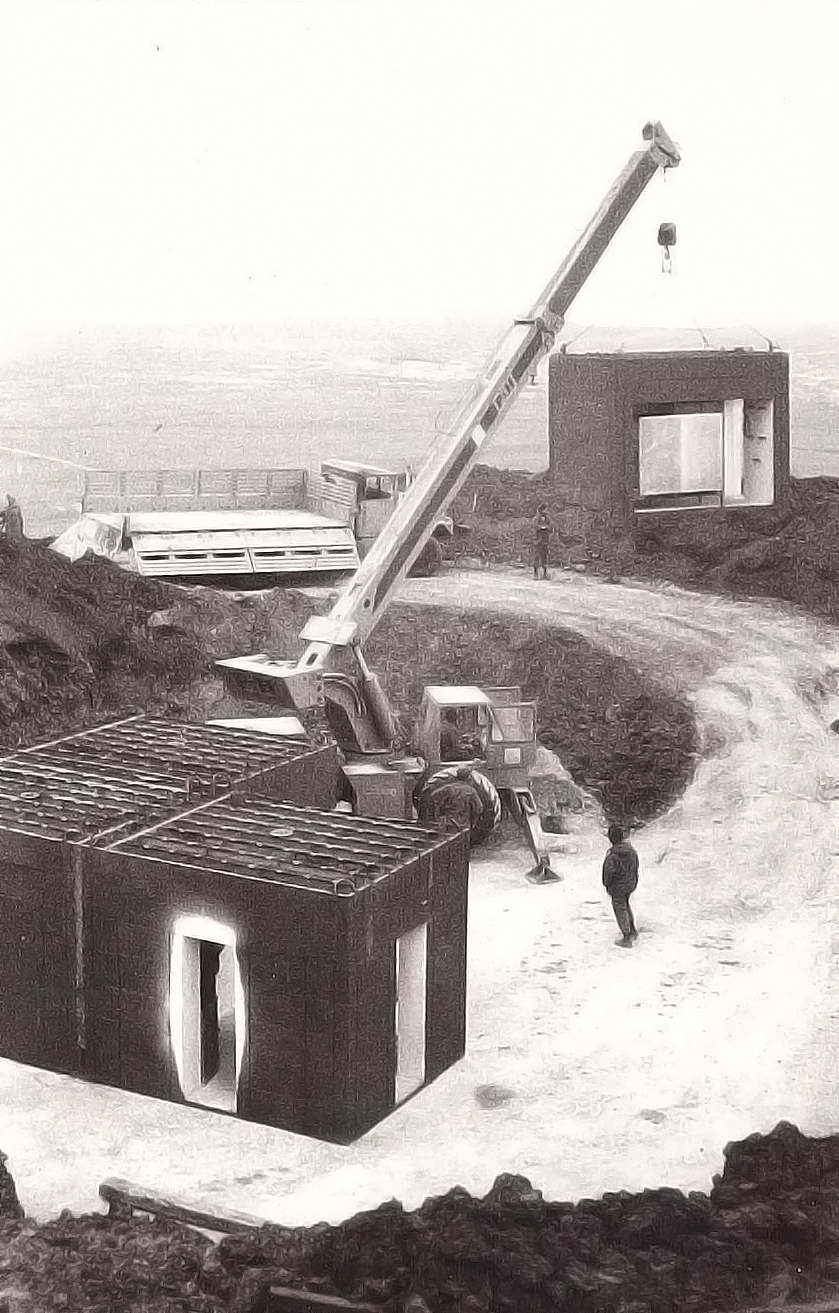 קוביות לסקוב